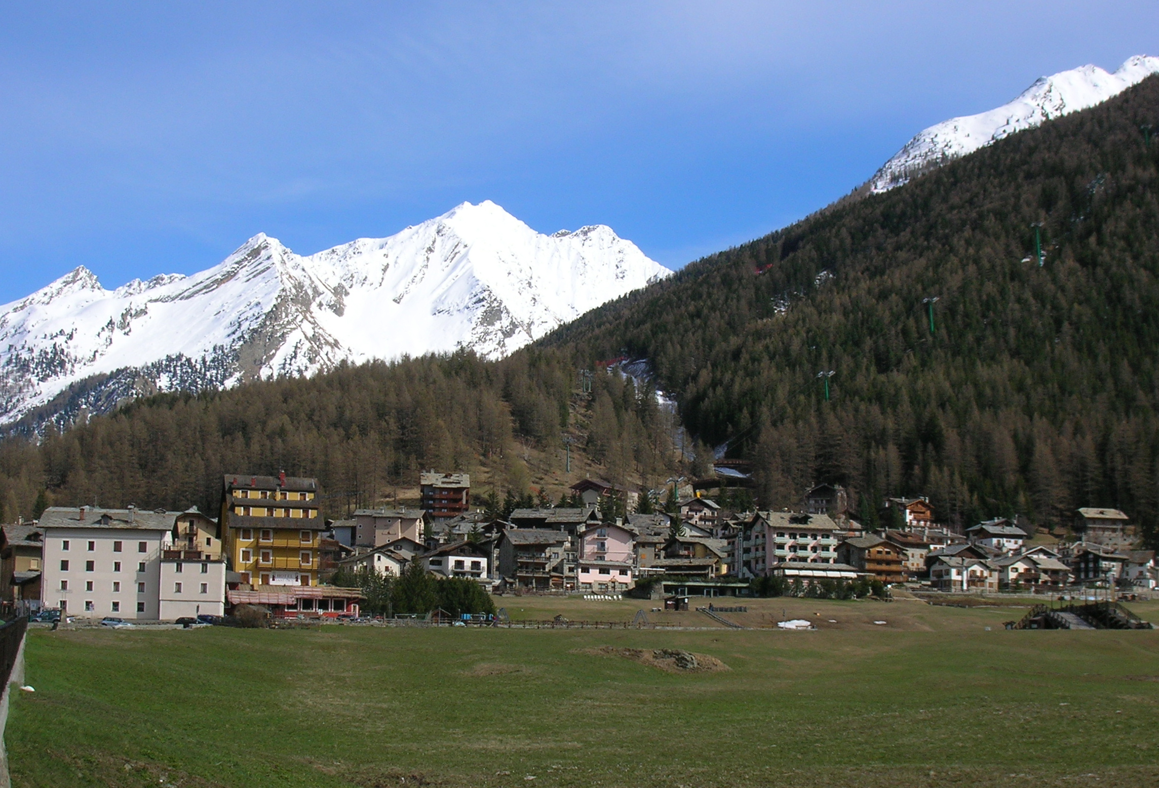 Panorama Cogne, Valle d'Aosta, Italia